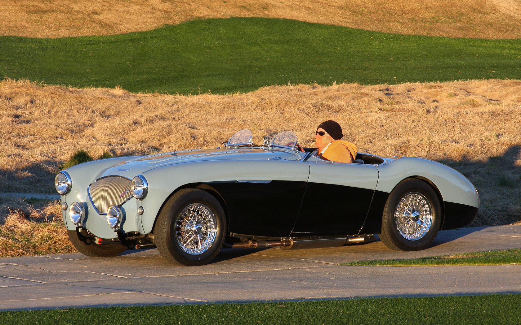 2011 Desert Classic, La Quinta, CA